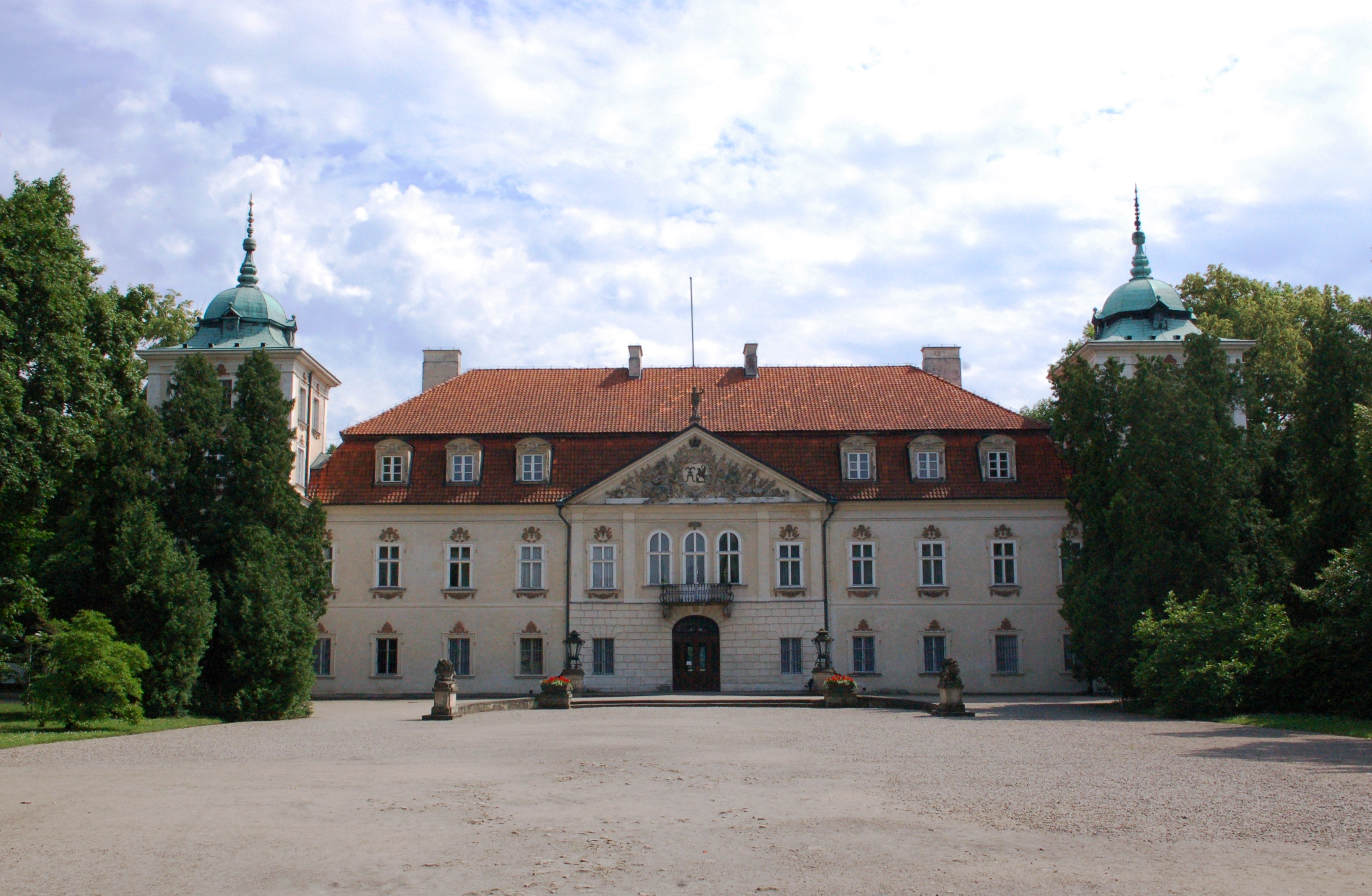 Polen, Nieborów Palast